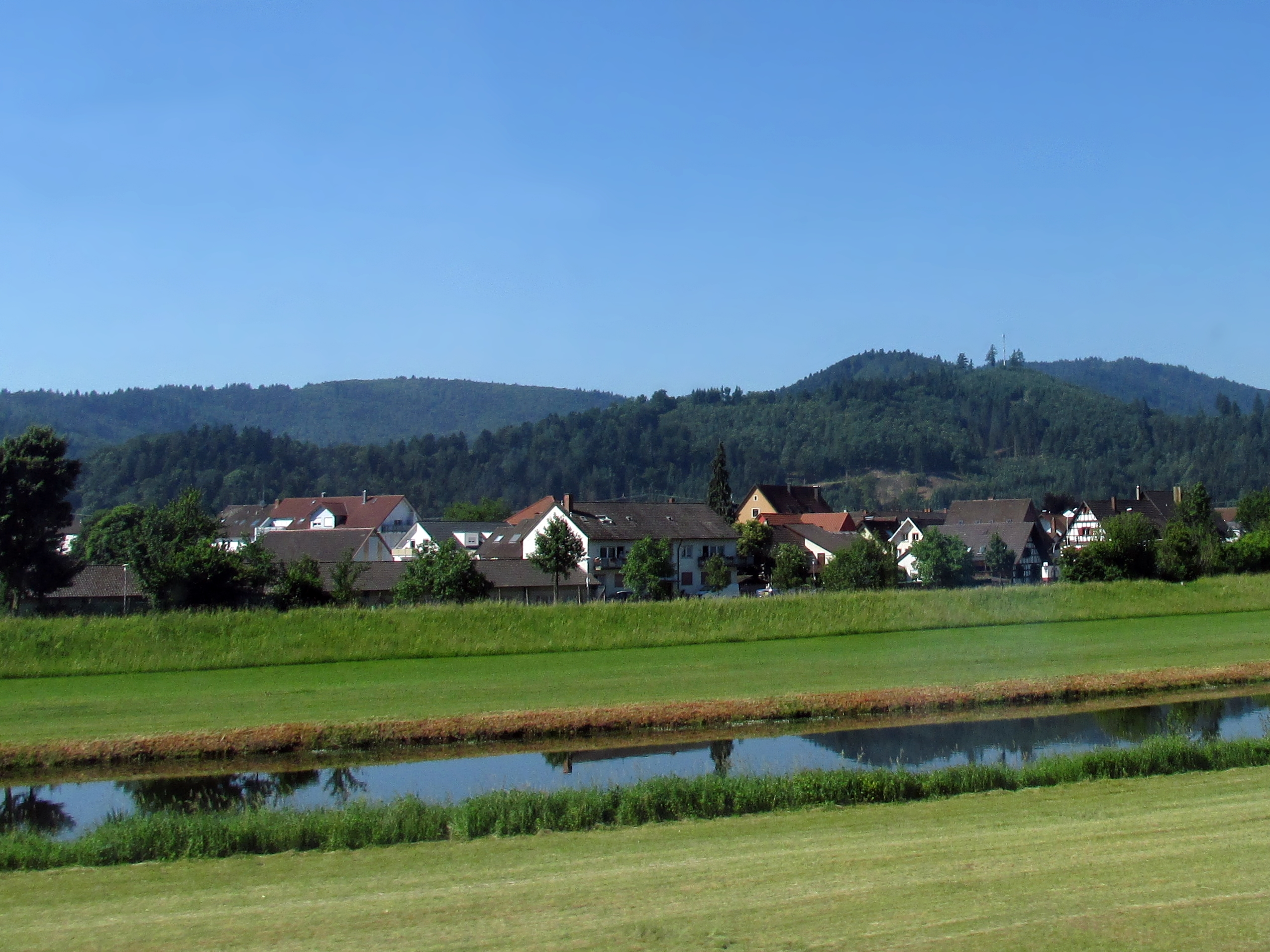 Berghaupten im Kinzigtal